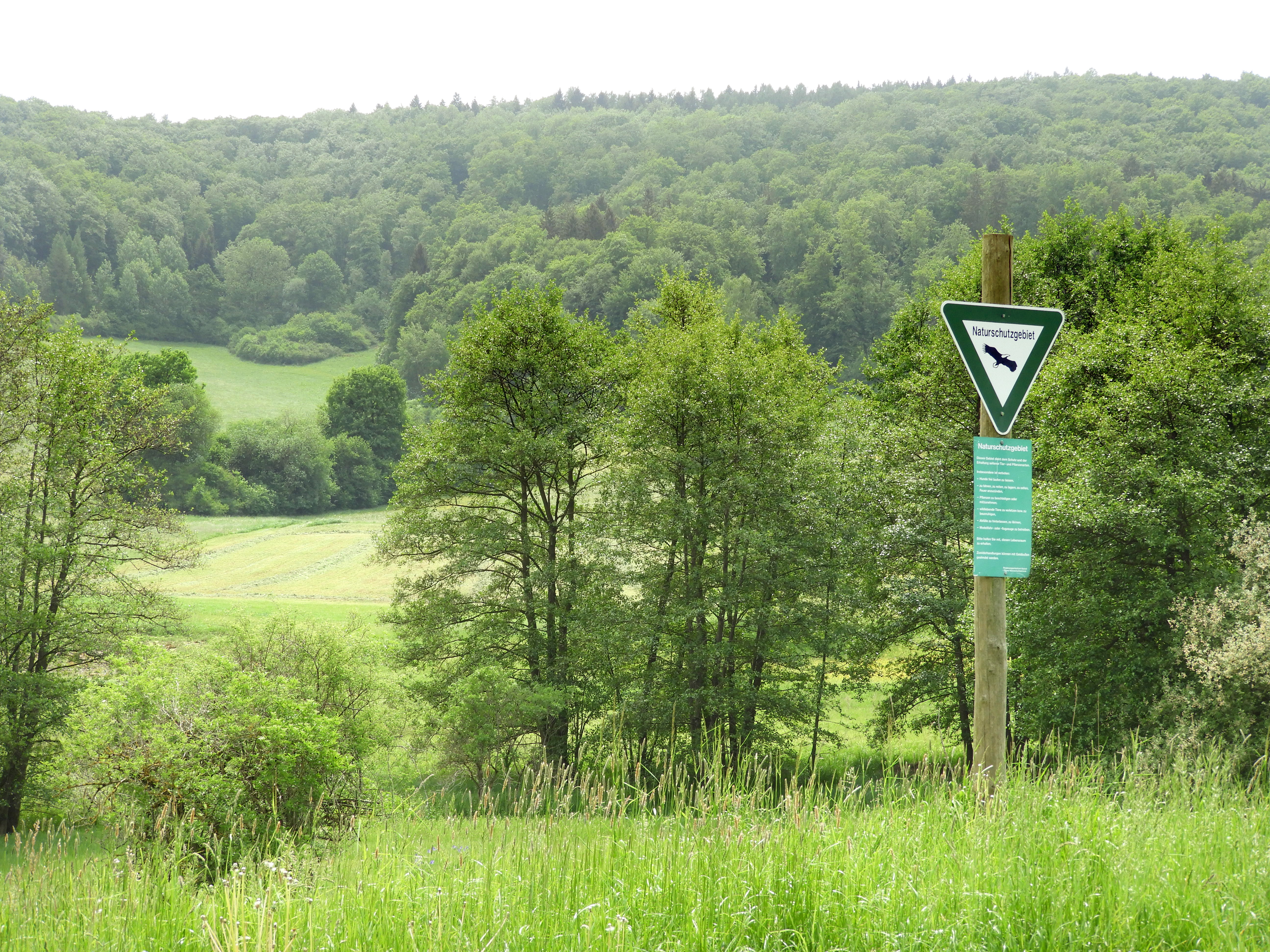 Blick von der Landstraße nach Osten über das Weißbachtal auf die Kalkberge. Das Weißbachtal bei Reichenbach ist ein durch landwirtschaftliche Nutzung geprägtes Wiesental nordöstlich des Ortsteils Reichenbach der Stadt Hessisch Lichtenau im nordhessischen Werra-Meißner-Kreis. Die naturschutzfachliche Bedeutung des Tals begründet sich vor allem auf das kalkreiche Niedermoor mit seinen Quellbereichen, das zum Standort bedrohter Pflanzenarten geworden ist. Um diesen wertvollen Lebensraum zu sichern und zu erhalten wurde 1990 das Weißbachtal als Naturschutzgebiet ausgewiesen und seit 2008 ist es als Flora-Fauna-Habitat-Gebiet Teil des europäisch vernetzten Schutzgebietssystems Natura 2000.